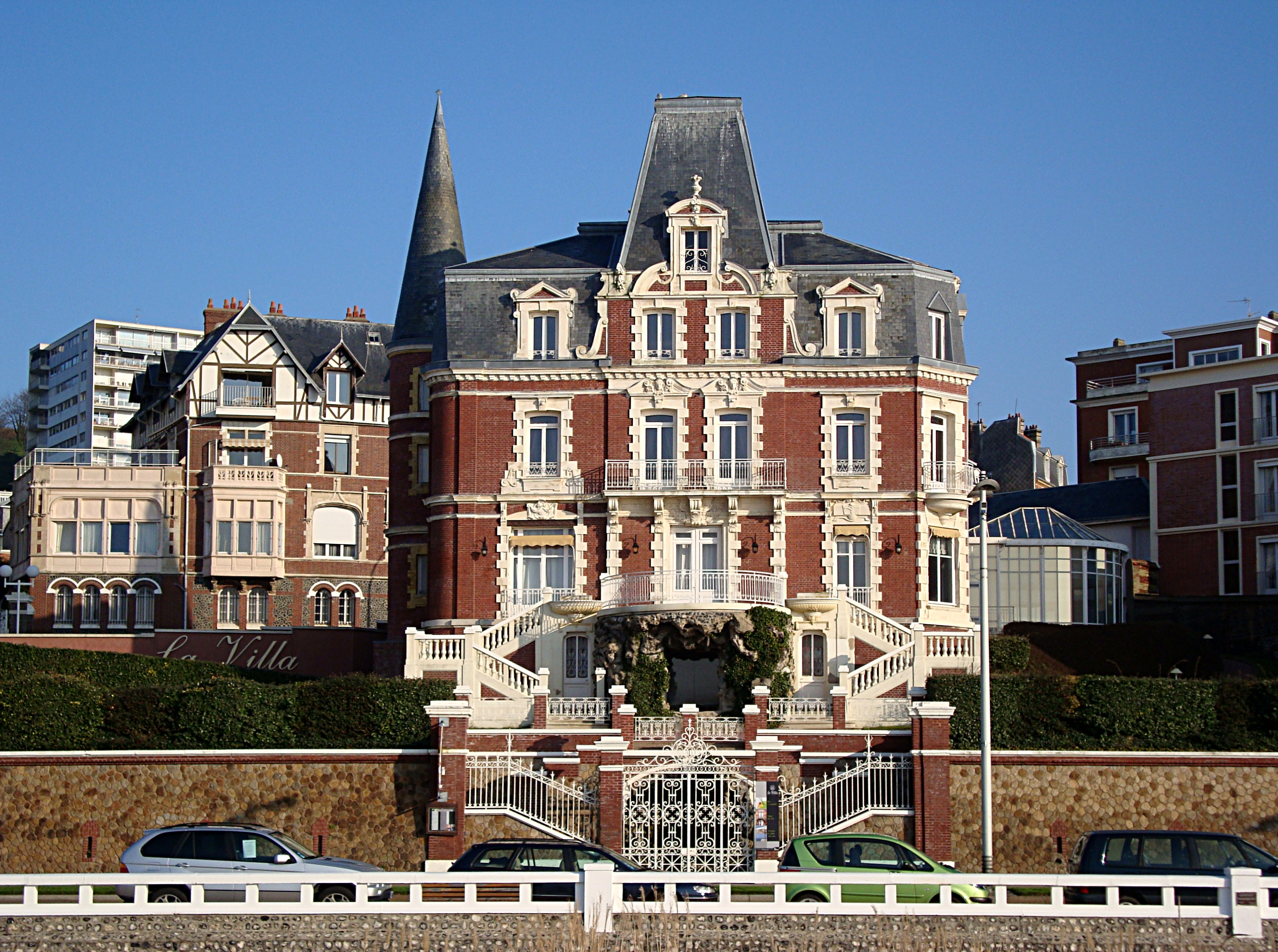 Boulevard Albert Ier, un restaurant gastronomique, La Villa, installé quelques années dans l'ancienne demeure d'Armand Salacrou au Havre (Seine-Maritime).